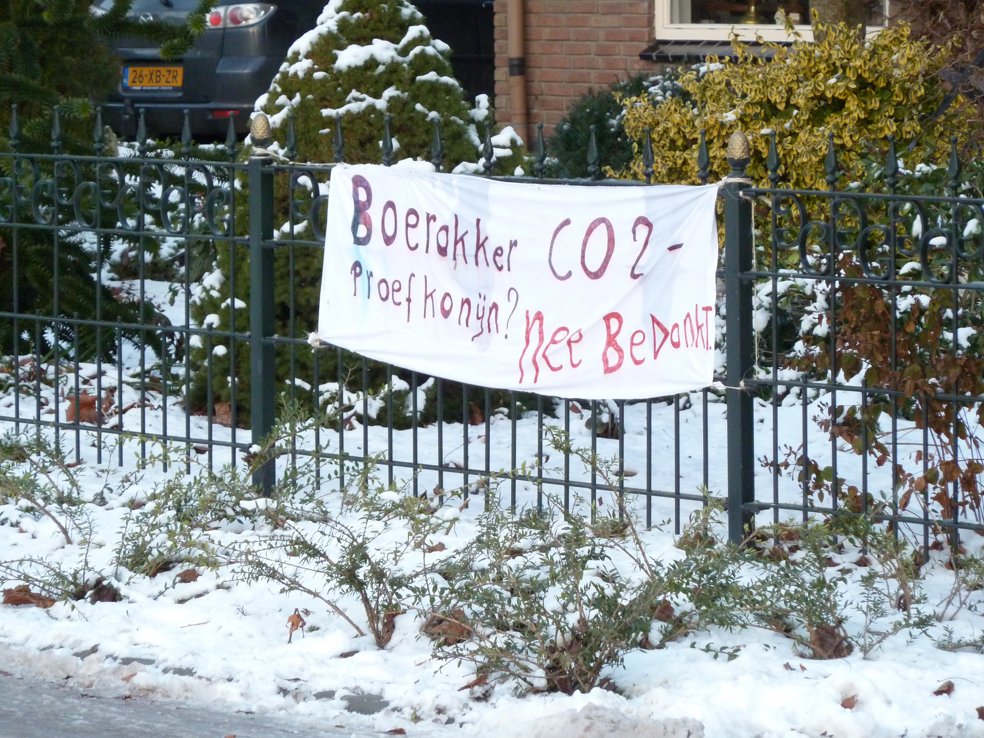 Hangdoek tegen CO2-opslag onder Boerakker aan de Hoofdweg van het dorp.